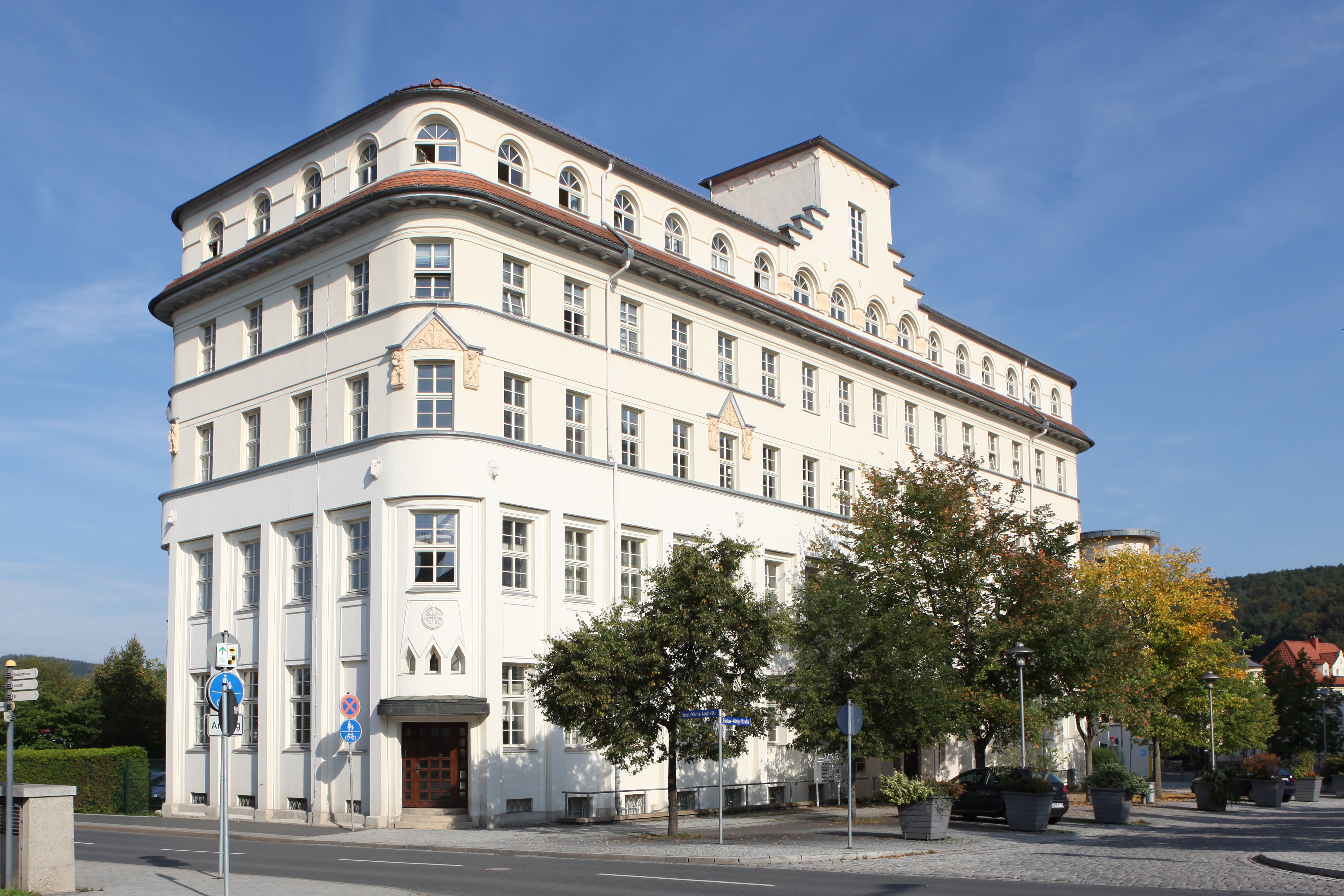 AOK, Massivbau mit Walmdach, 1922/23 von Franz Boxberger und Ernst Herbart als Geschäfts- und Lagerhaus, Sonneberg, Bahnhofsplatz 5